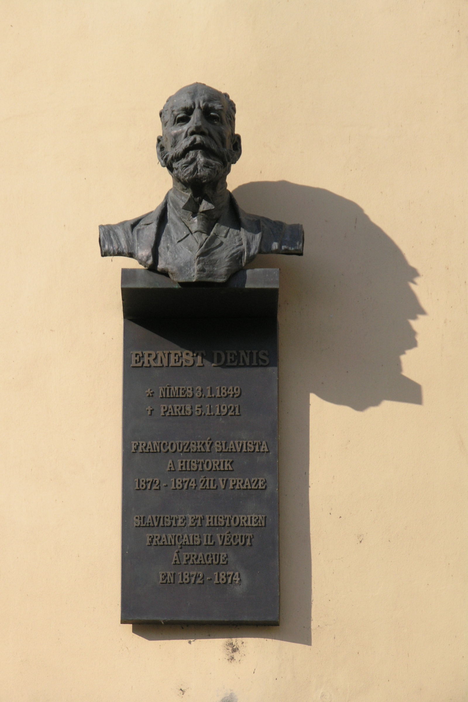 Praha, Malostranské náměstí 27 - Ernest Denis (pamětní deska s bustou)